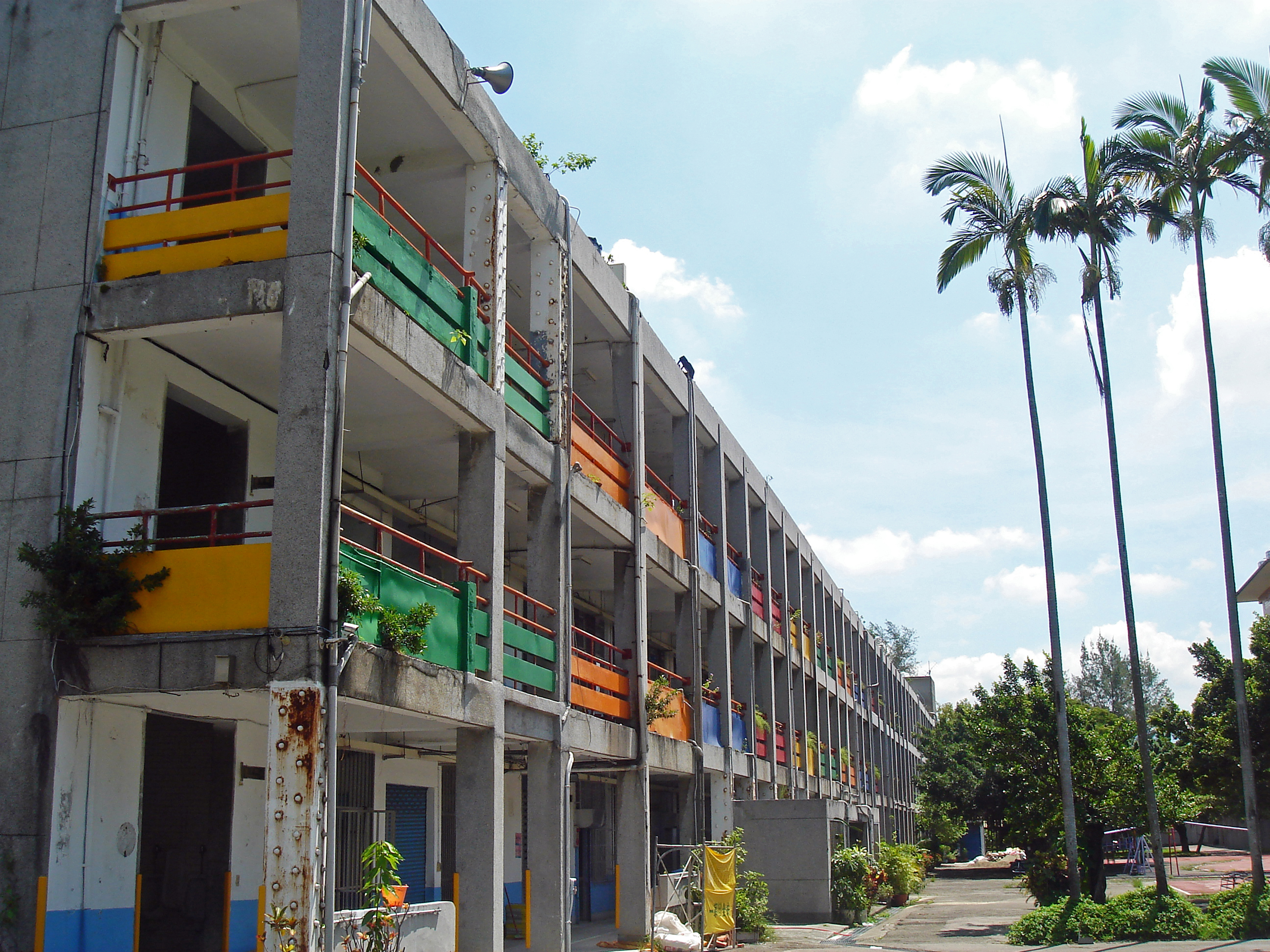 臺中市東區成功國民小學舊校舍（尚存）。